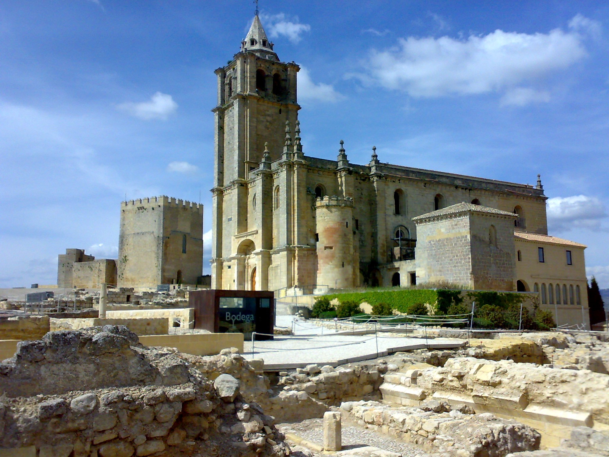 Vista de la plaza alta de la fortaleza dela mota desde la torre de la cárcel, iglesia mayor, capilla del deán y casas de cabildo. Al fondo, la alcazaba.